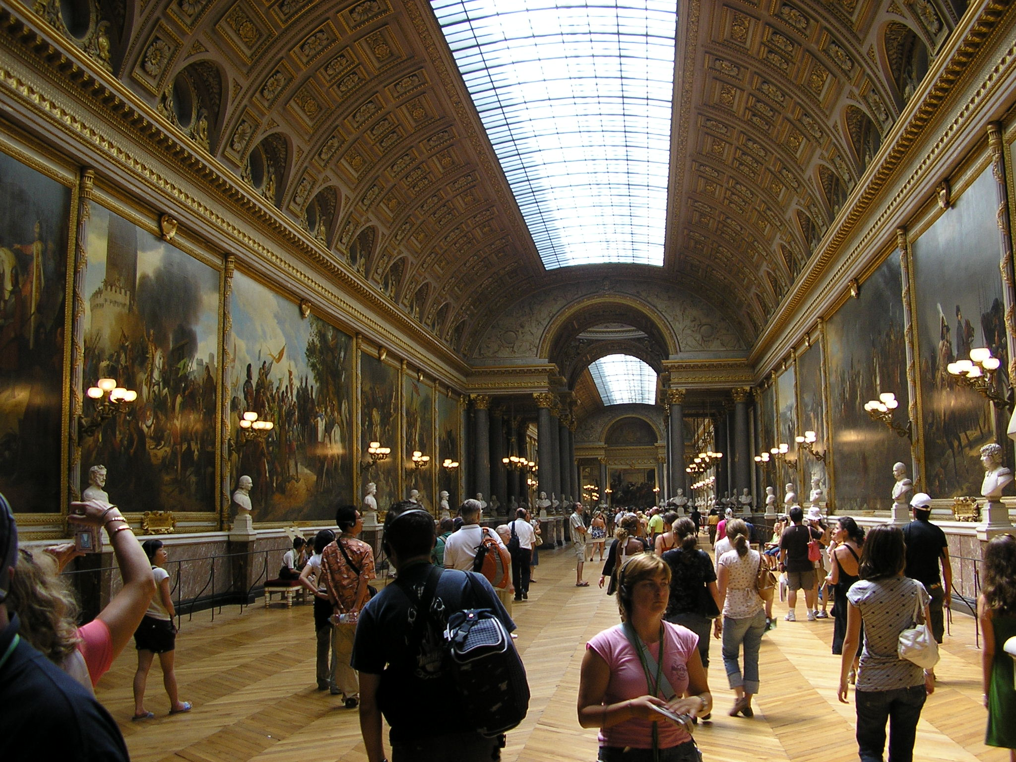 La Galería de las batallas en el Palacio Real de Versailles.